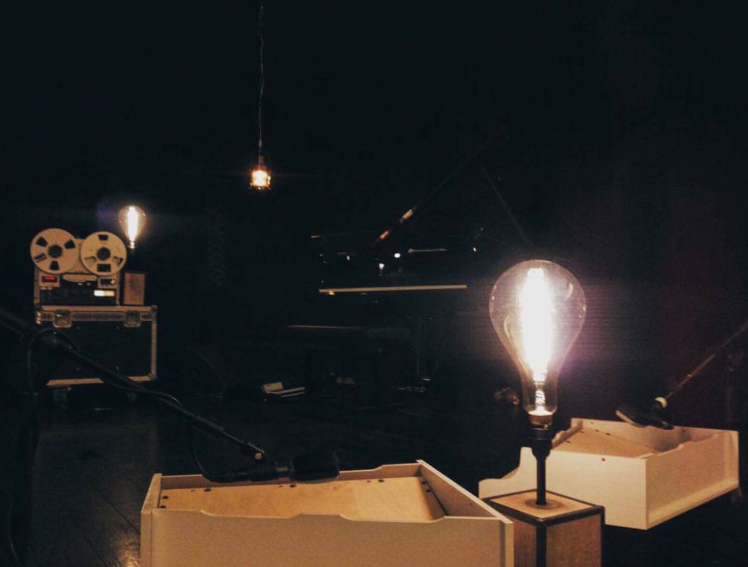 Scenografia del concerto Eusa